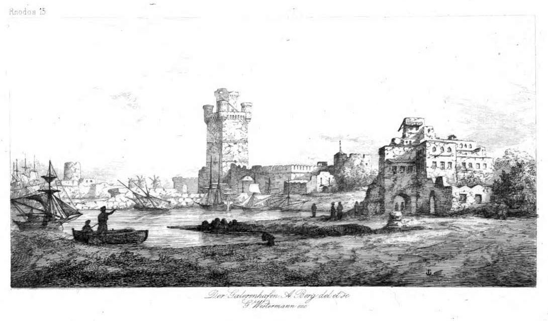 from: Albert Berg Die Insel Rhodus, aus eigener Anschauung und nach den vorhandenen Quellen historisch, geographisch, archäologisch, malerisch beschrieben und durch Originalradierungen und Holzschnitte nach eigenen Naturstudien und Zeichnungen illustrirt (1861) Der Galeerenhafen